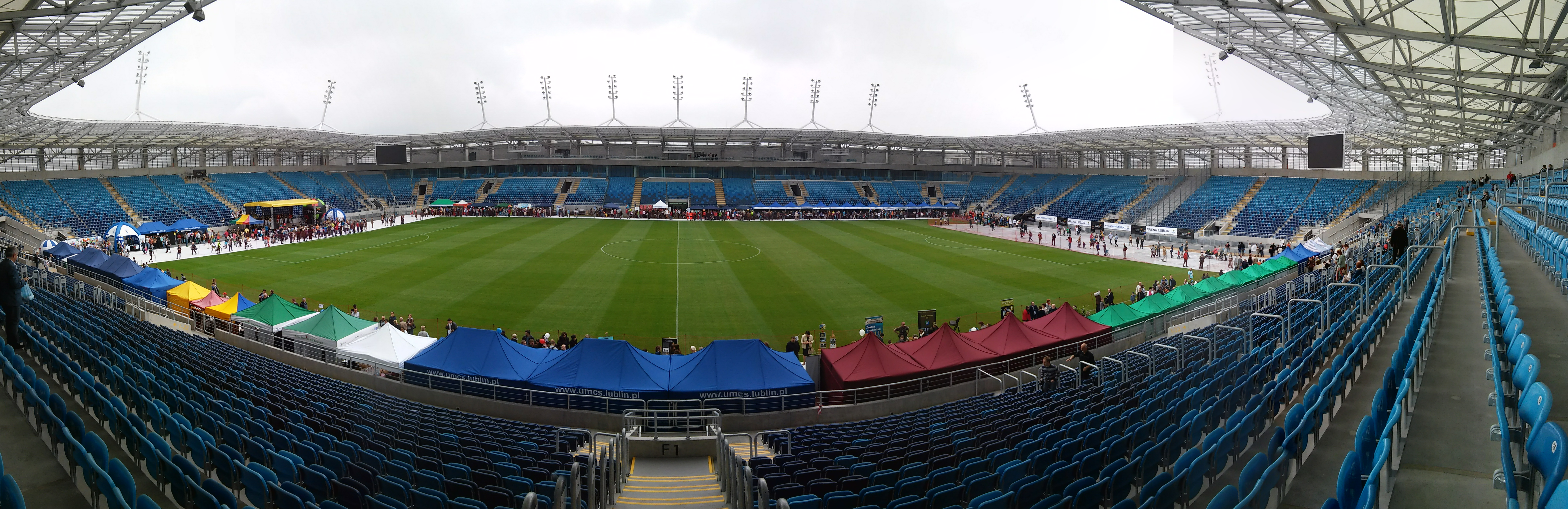 Arena Lublin podczas XI Lubelskiego Festiwalu Nauki.